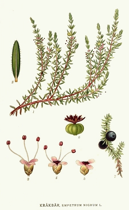 Original Description Kråkbär, Empetrum nigrum L.